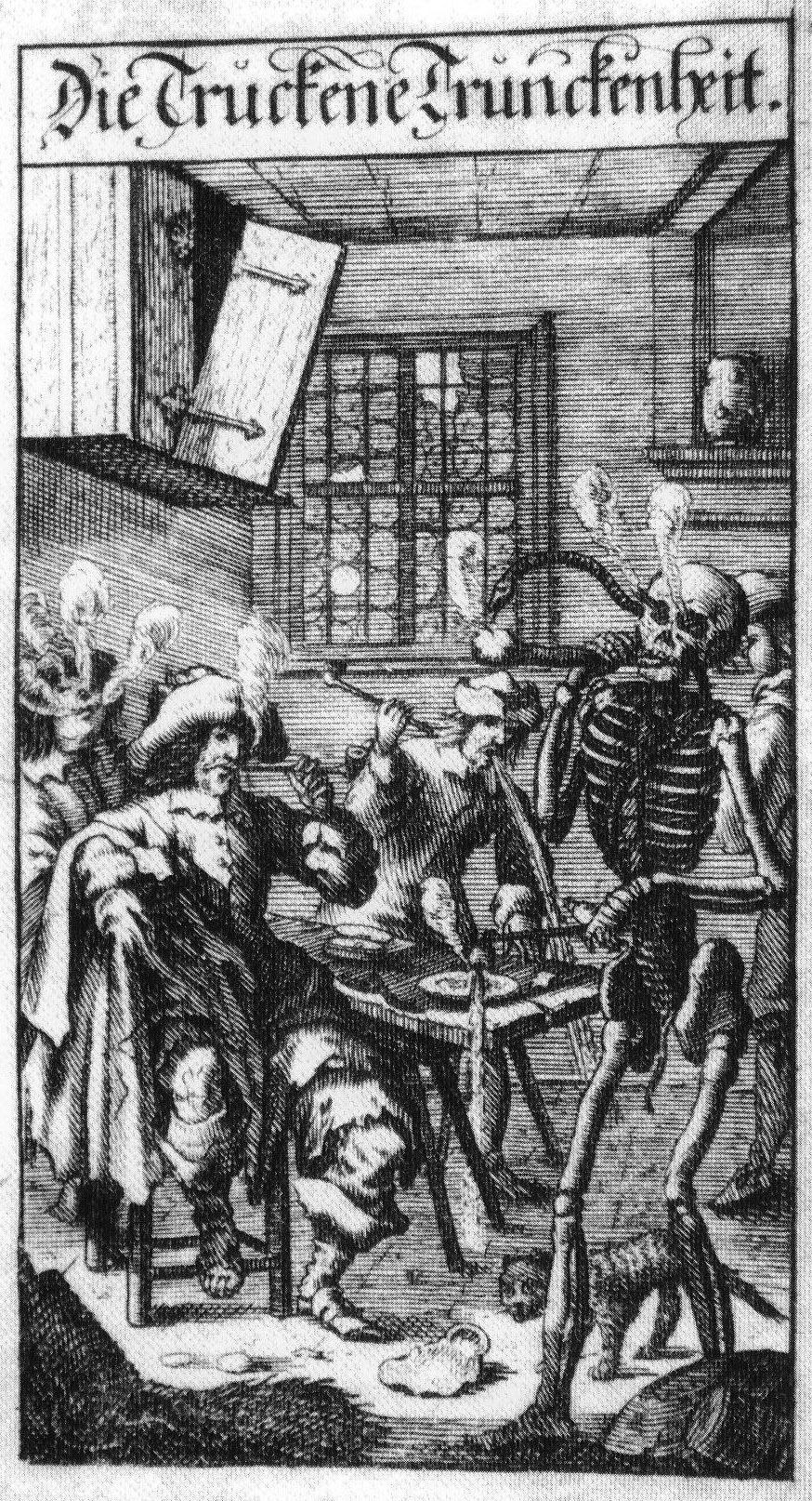 Engraving from Jakob Balde's Die truckene Trunkenheit ("The Dry Drunkenness"), Nuremberg, 1658.